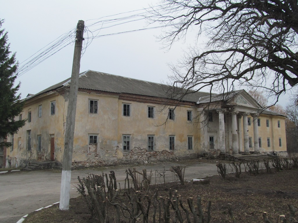 Палац (мур.), село Лісоводи